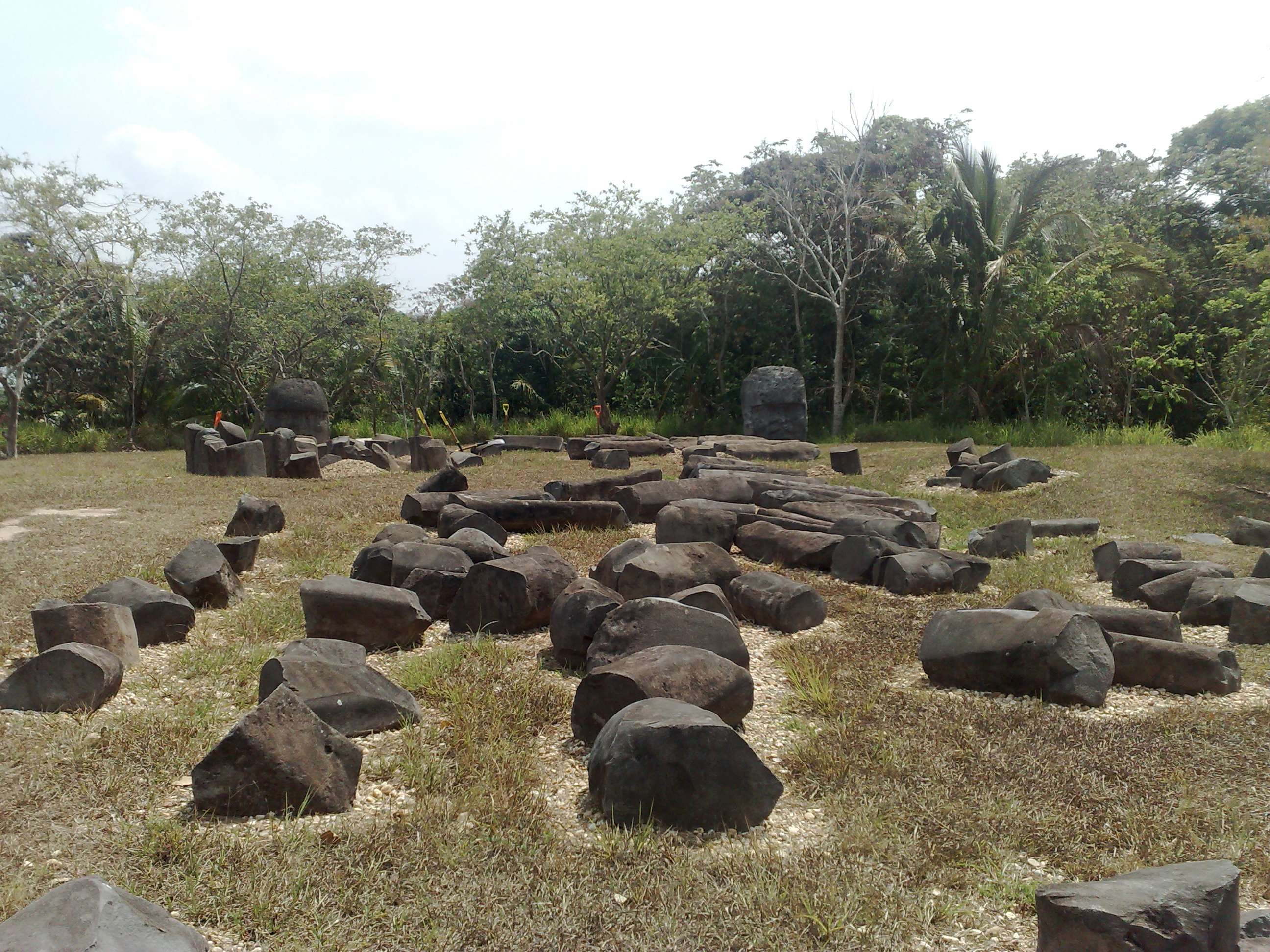 Complejo "A" zona arqueológica de La Venta (Olmec), Tabasco, México.